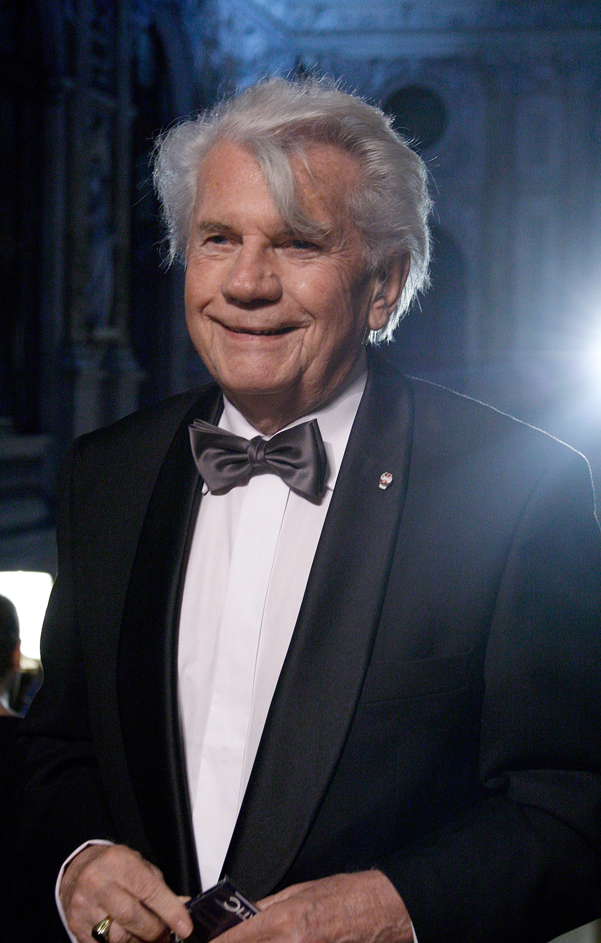 Gerhard Klingenberg zu Gast bei der Verleihung des Nestroy-Theaterpreises 2010 im Burgtheater in Wien.